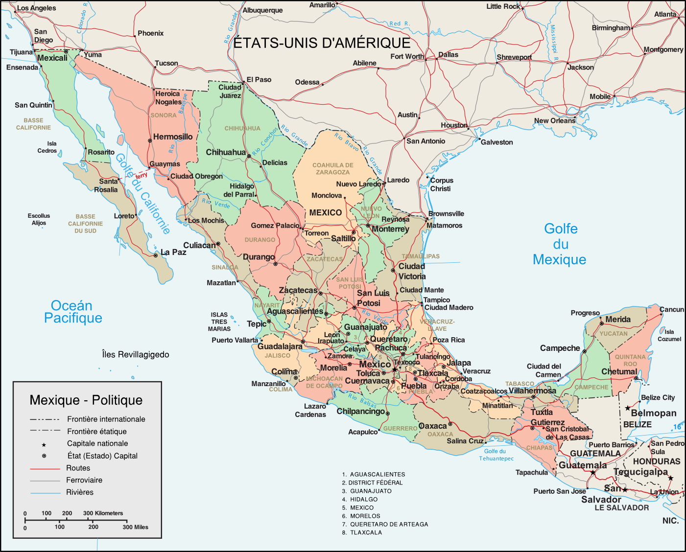 Carte administrative du Mexique